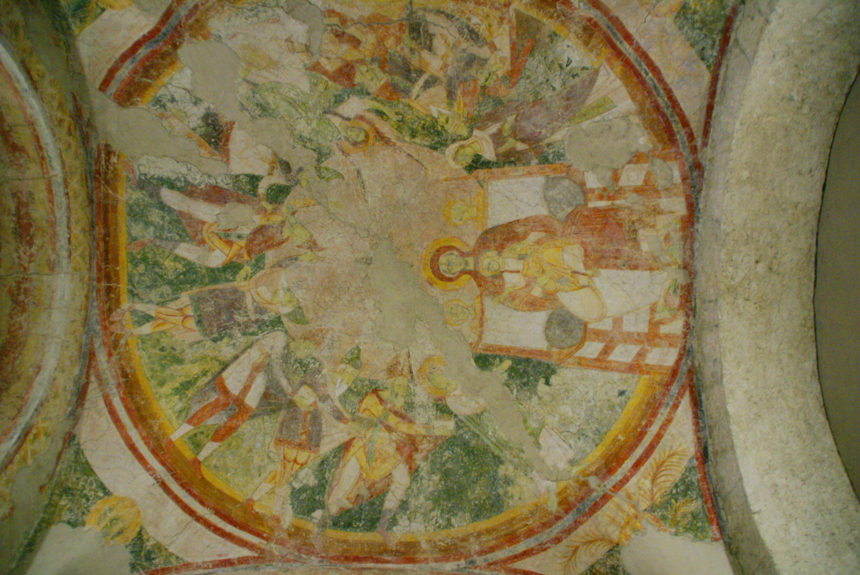 Stift Lambach - romanische Fresken